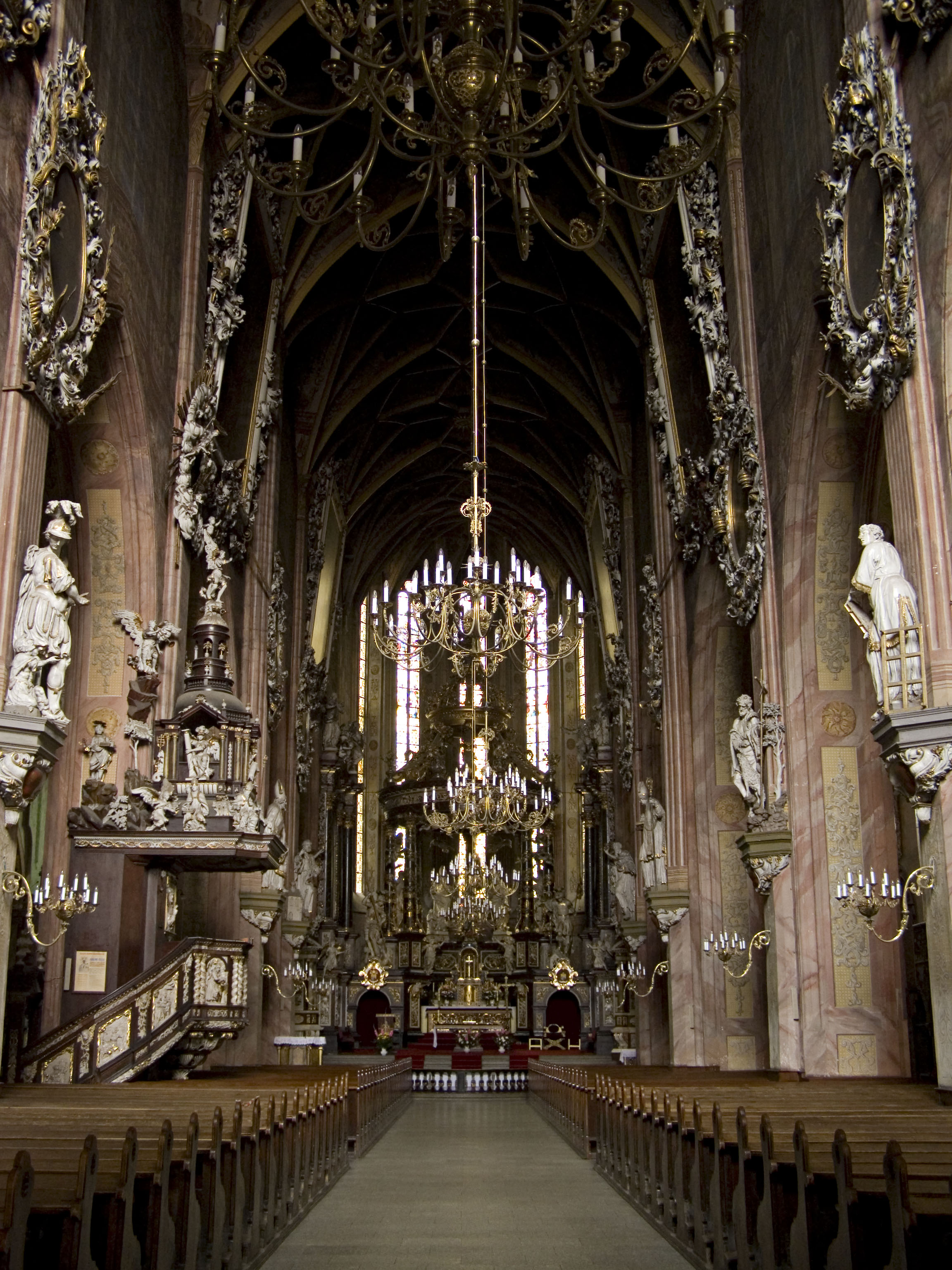 Świdnica, Katedrála svatého Václava a Stanislava